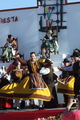 Festival de Mayos en Pedro Muñoz